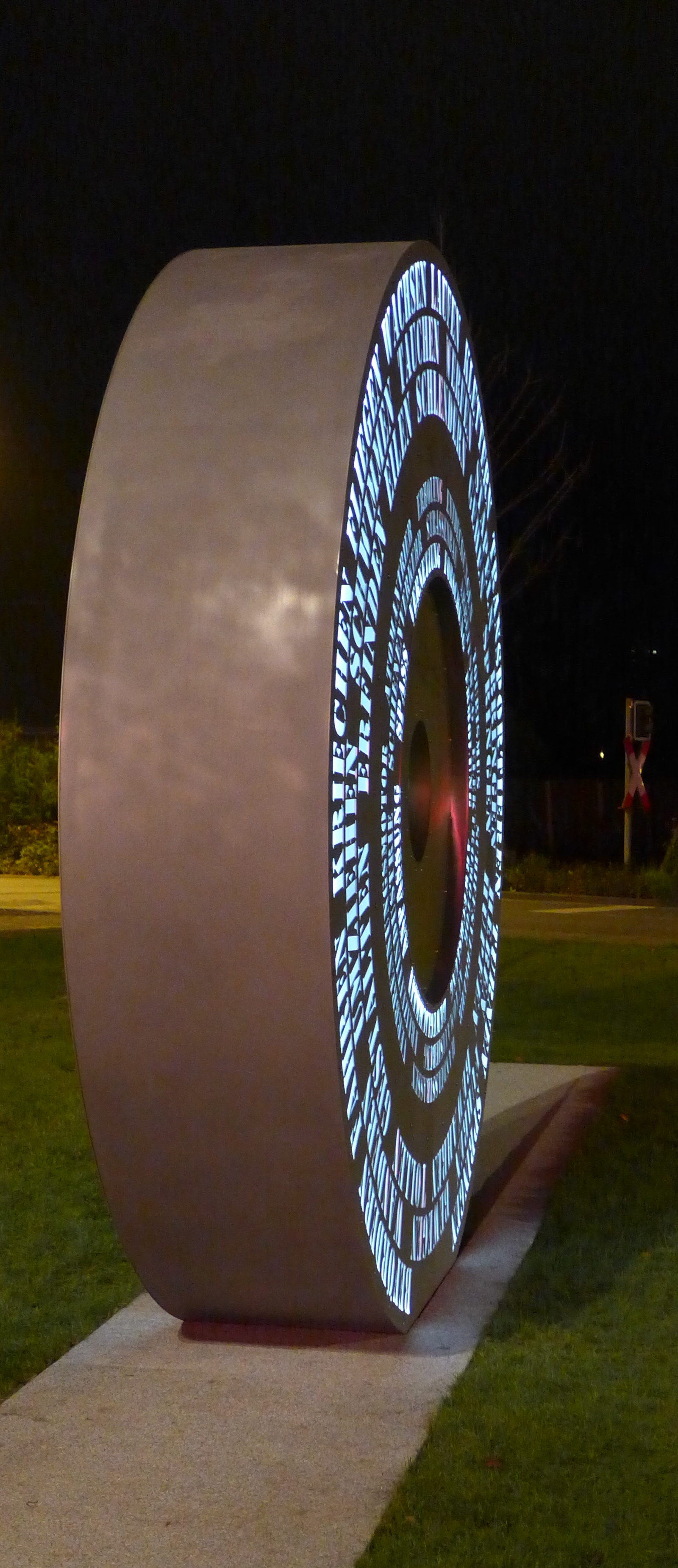 Neues Rad am Einbecker PSSpeicher